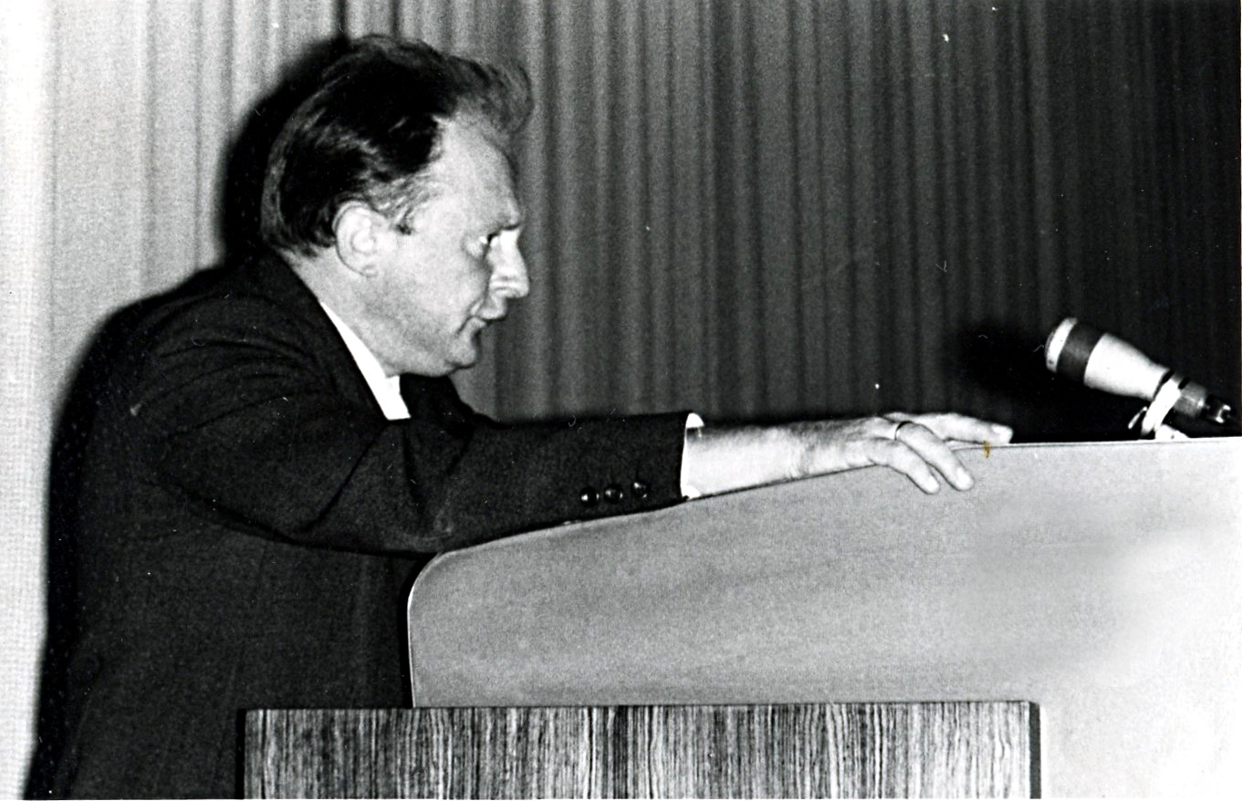 Prof. J. Auth während einer Vorlesung an der Humboldt-Universität